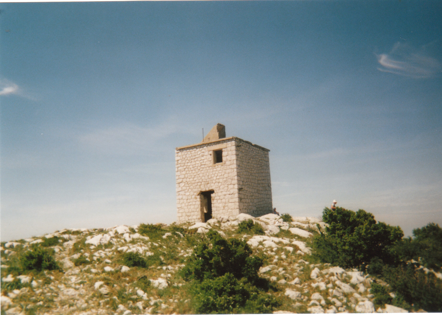 tour des Opies